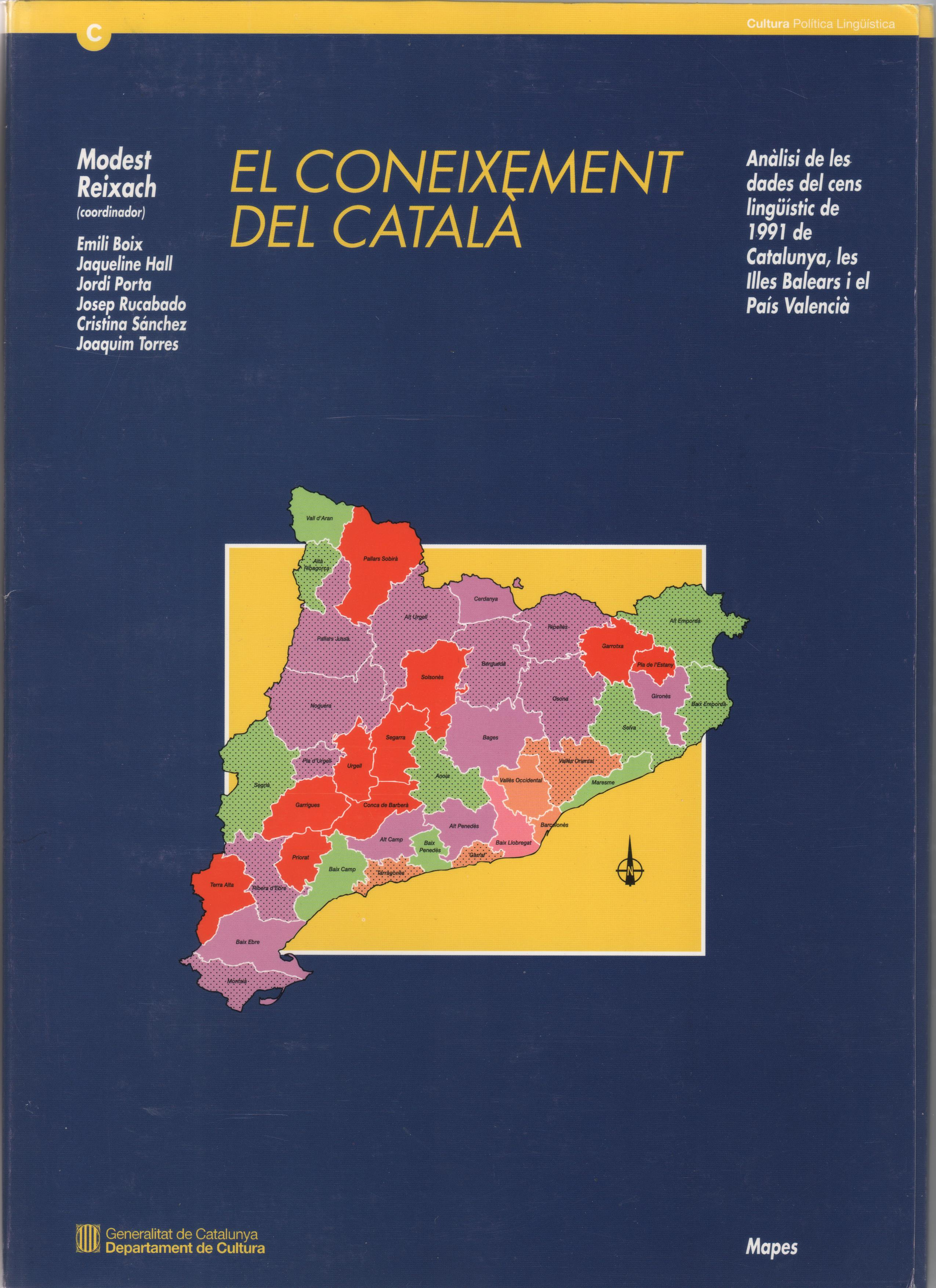 Coberta de l'últim dels tres estudis sociolingüístics realitzats per Modest Reixach a partir de les dades dels censos i padrons. Aquest es basa en els resultats del cens del 1991 a Catalunya, les IllesBalearls i el País Valencià.